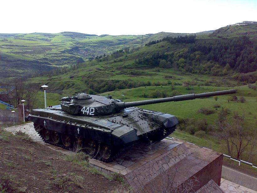 Հաղթանակից մի քանի քայլ հեռու